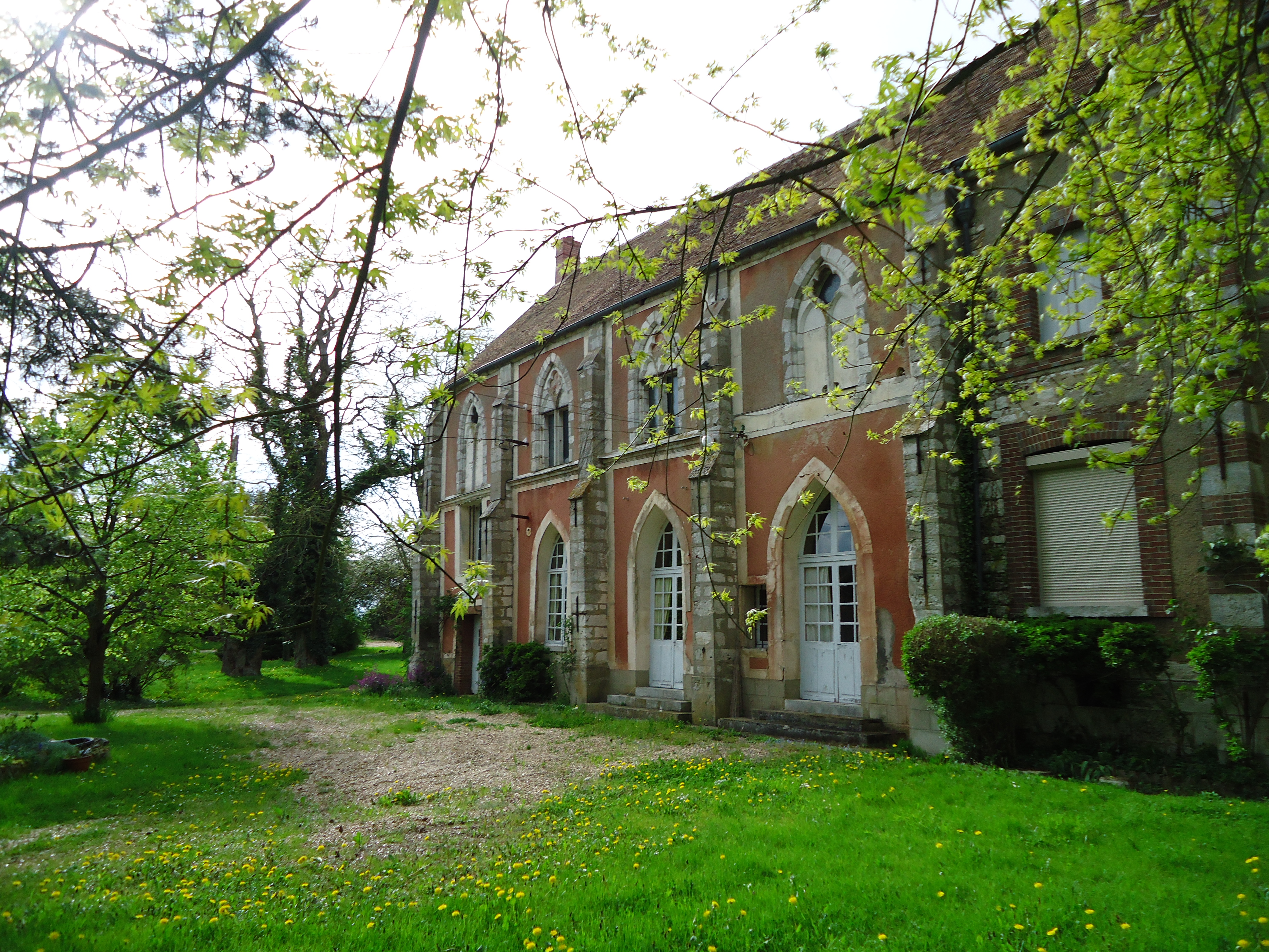 Mézières-en-Vexin - Manoir de Surcy (XIIIe - XVIe).